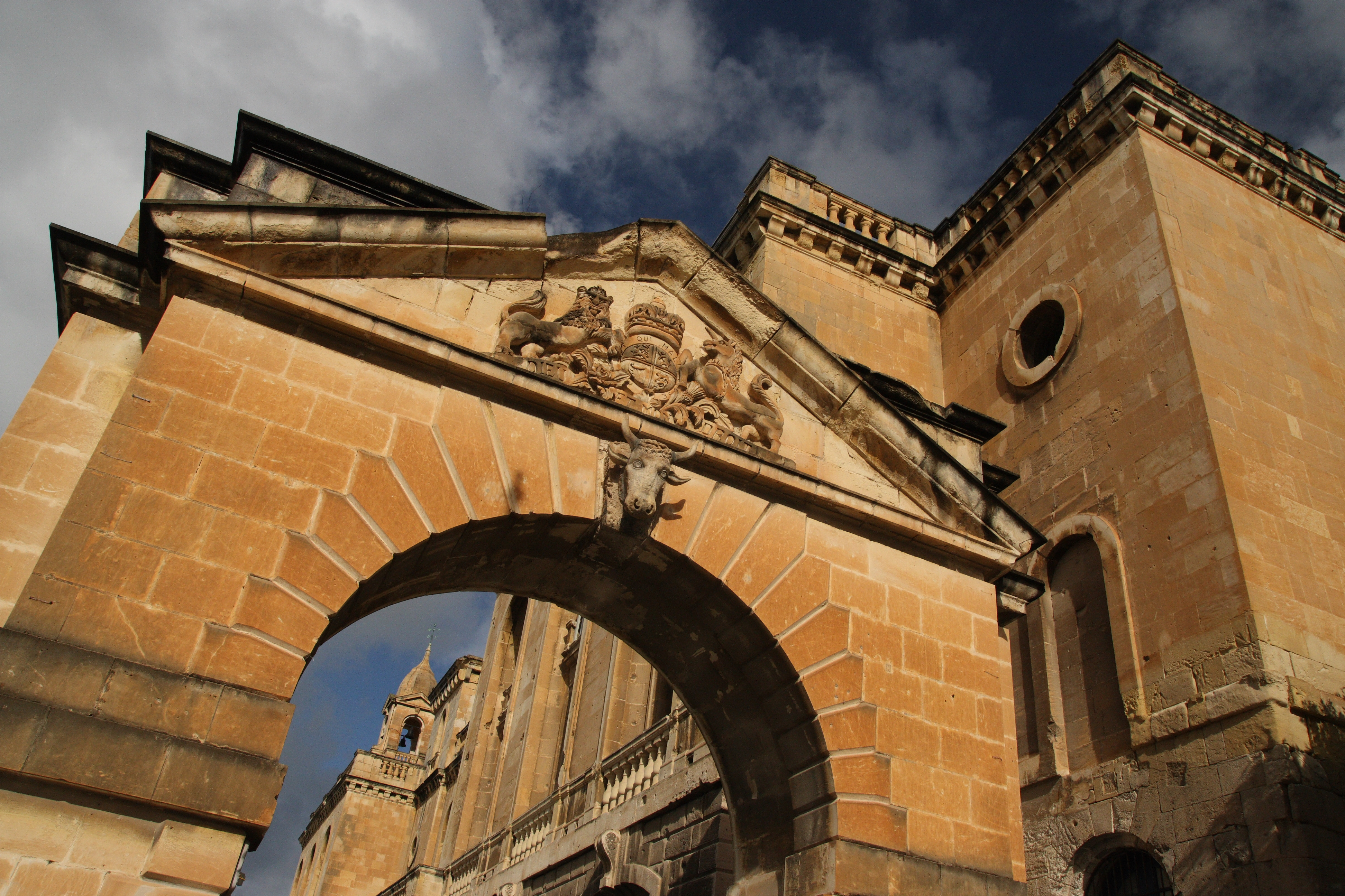 Vittoriosa, Malta